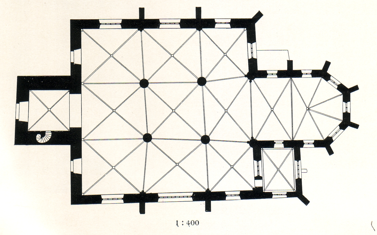 Altstädter Nicolaikirche Bielefeld